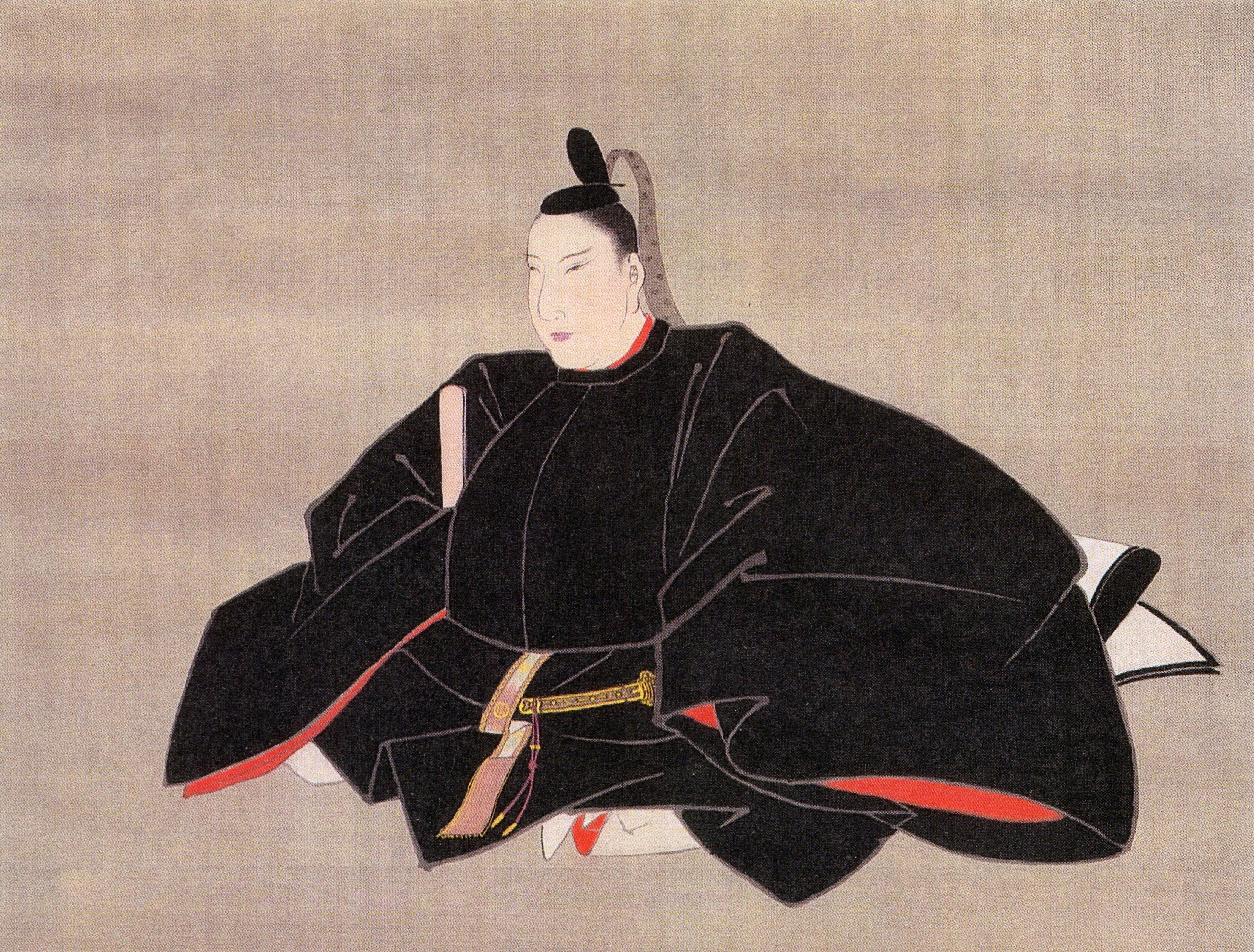 田村通顕(伊達茂村)の肖像。